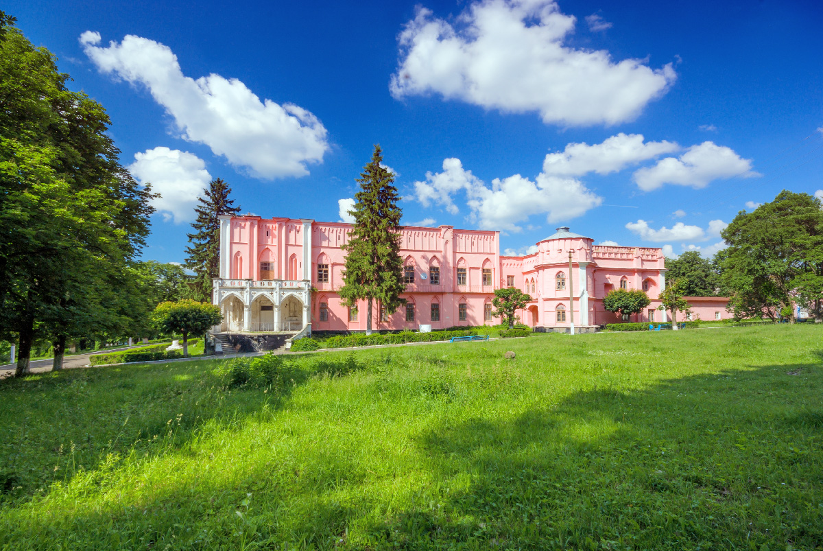 Чернятинський парк, Жмеринський район, Чернятинська сільська рада